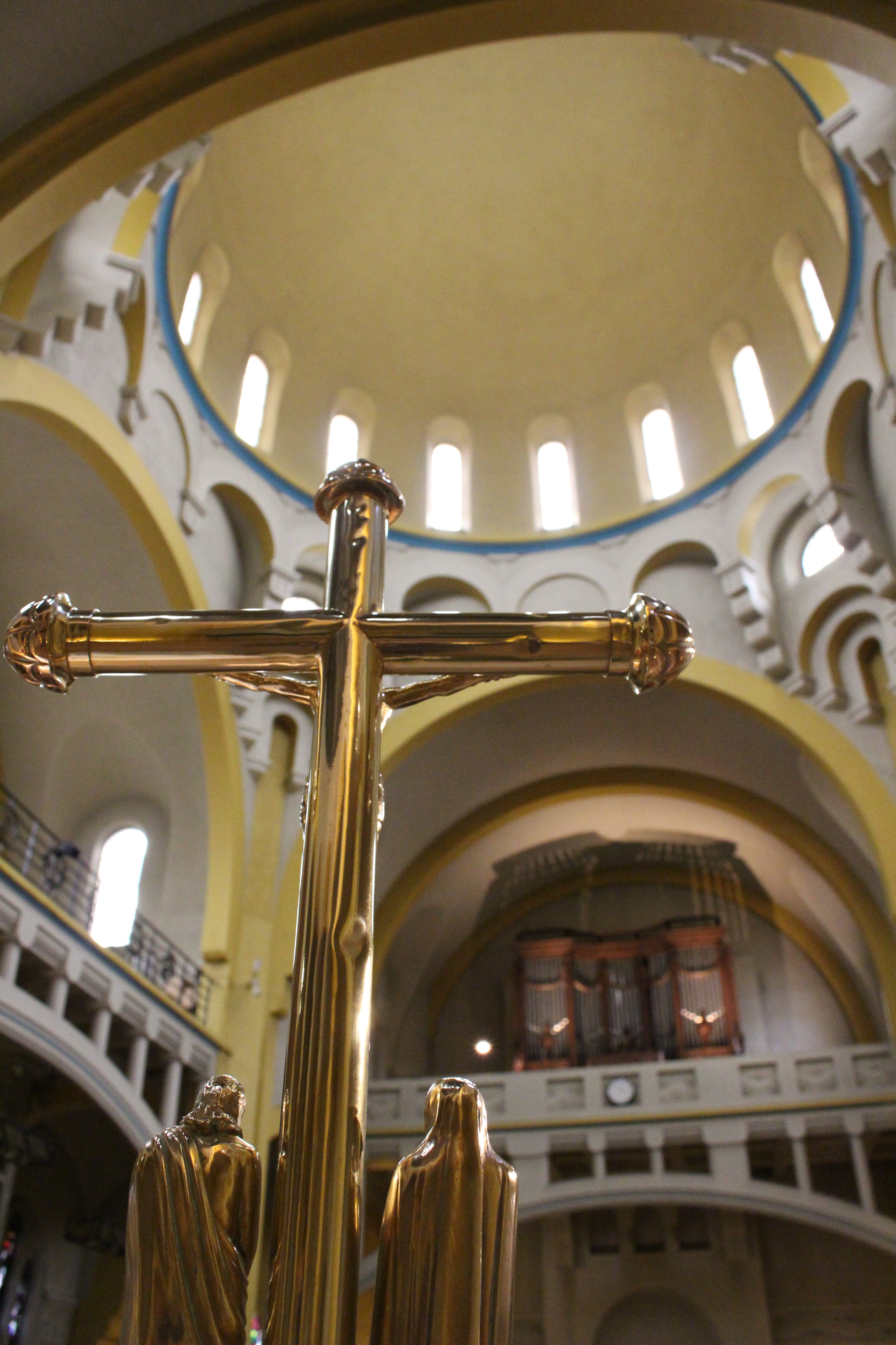 Eglise Saint Dominique